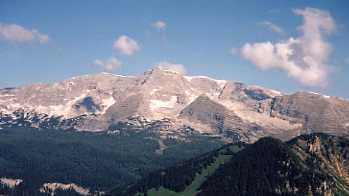 Warscheneck (Südost Seite) Fotografiert von Tigerente Mai 2003 / Bosruck Warscheneck und Wurzeralm